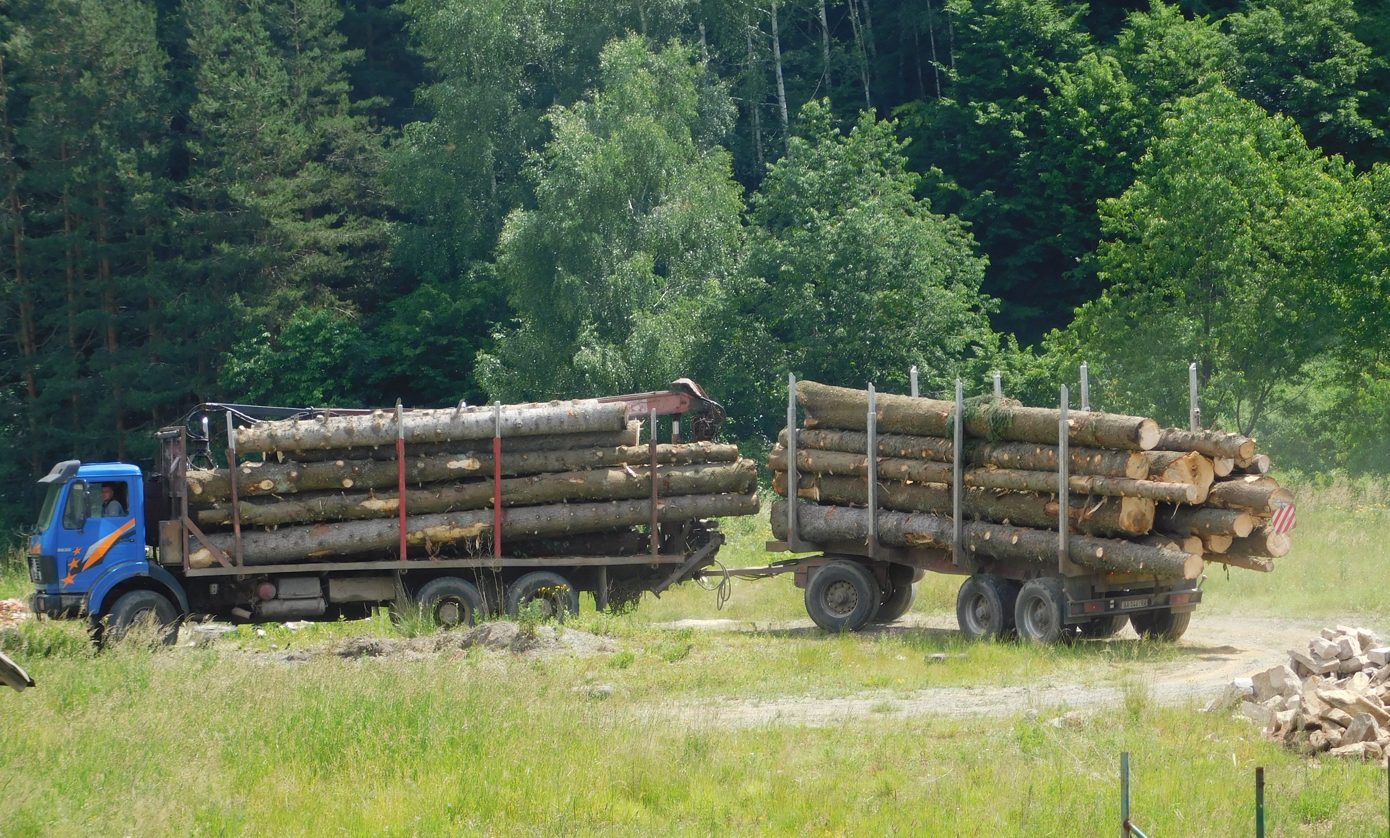 Srpski (latinica): Seča šuma u Nacionalnom parku ,,Kopaonik" direktno ugrožava pojedine zaštićene i strogozaštićene vrste ptica.